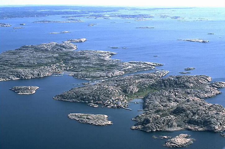 Stora och Lilla Kornö (Lyse sn). Väl bevarade fiskelägen. Kontakten näringsliv - bebyggelsen är påtaglig. Tidsskede 1700-1800-tal. Motiv: Stora och Lilla Kornö Nyckelord: Flygbilder, Riksintressen Kategori: Kust- och skärgårdsmiljöStora och Lilla Kornö (Lyse sn). Väl bevarade fiskelägen. Kontakten näringsliv - bebyggelsen är påtaglig. Tidsskede 1700-1800-tal.